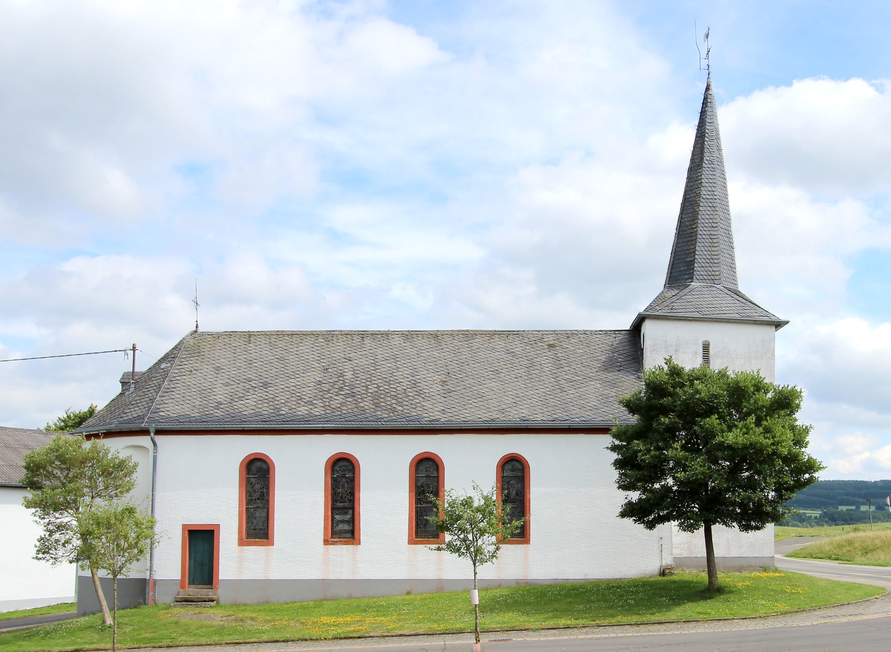 54608 Oberlascheid, An der Kirche. Saalbau; Schiff und Chor von 1848, eventuell mit älteren Teilen, Turm angeblich aus dem 18. Jahrhundert, wohl älter, eventuell mittelalterlich. Aufnahme von 2017.